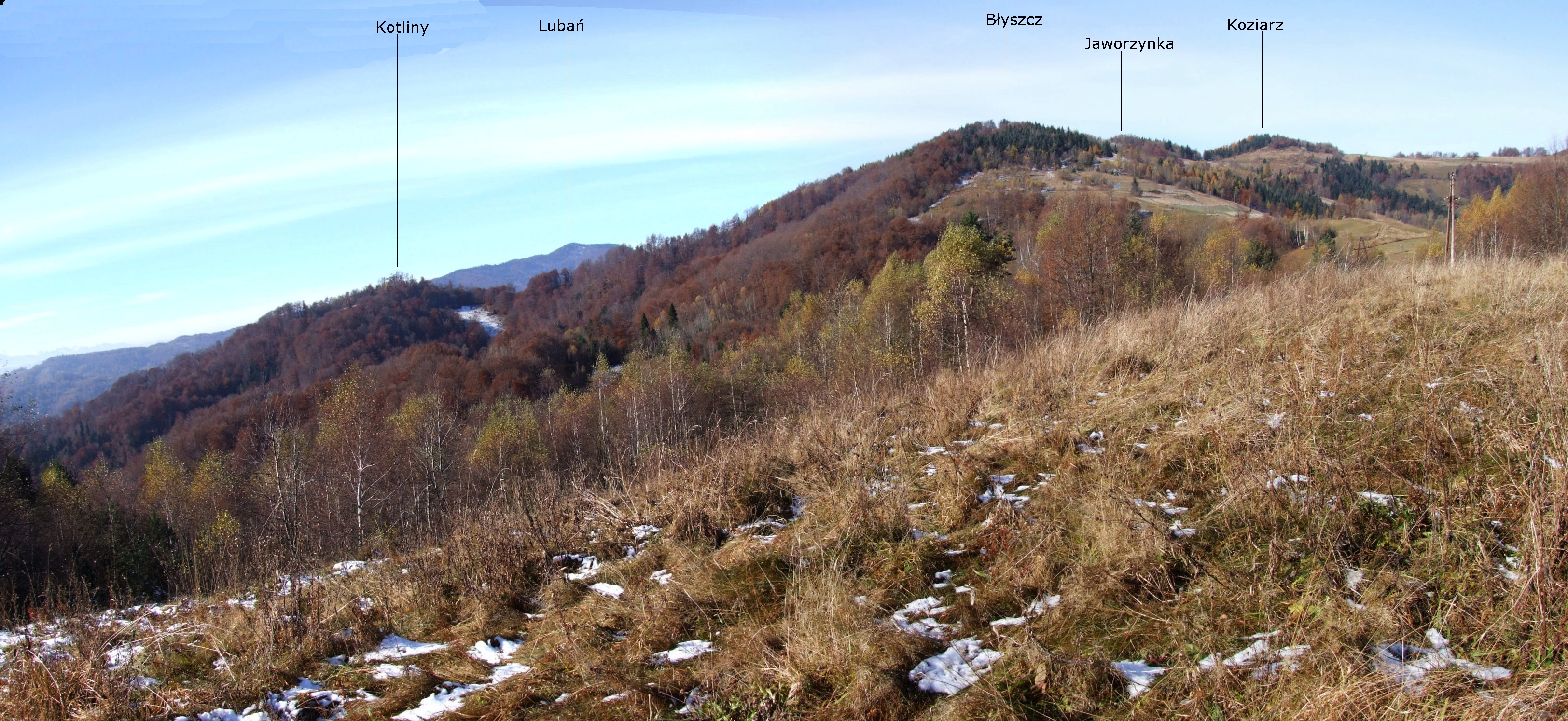 Widok ze stoków Dzwonkówki